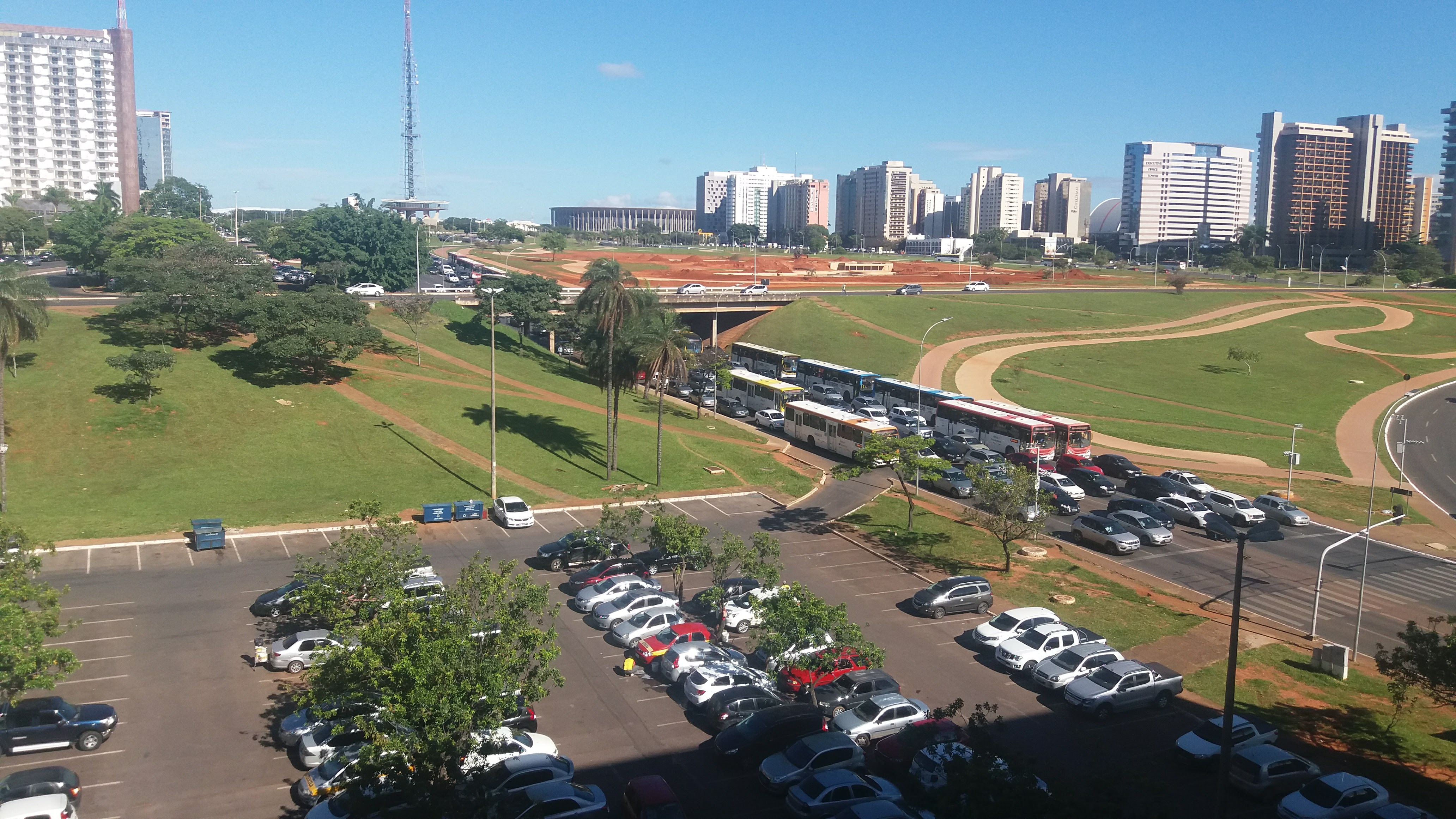 Centra parto de Braziljo, vidata tra fenestro de Brazila Esperanto-Ligo.